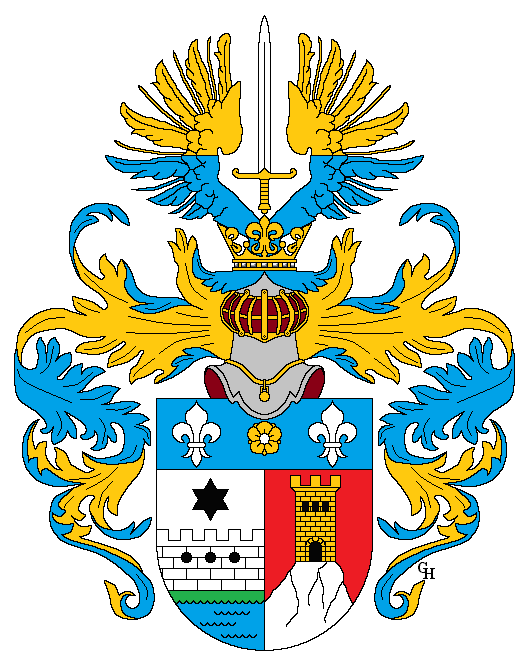 Wappen des k.u.k. Feldmarschalleutnants Hermann Kusmanek (1860–1934), verliehen anlässlich seiner Erhebung in den österreichischen Adelsstand mit dem Prädikat "von Burgneustädten" 1913. Zeichnung von Gerd Hruška ( Für weitere Informationen zu dieser Standeserhebung siehe (